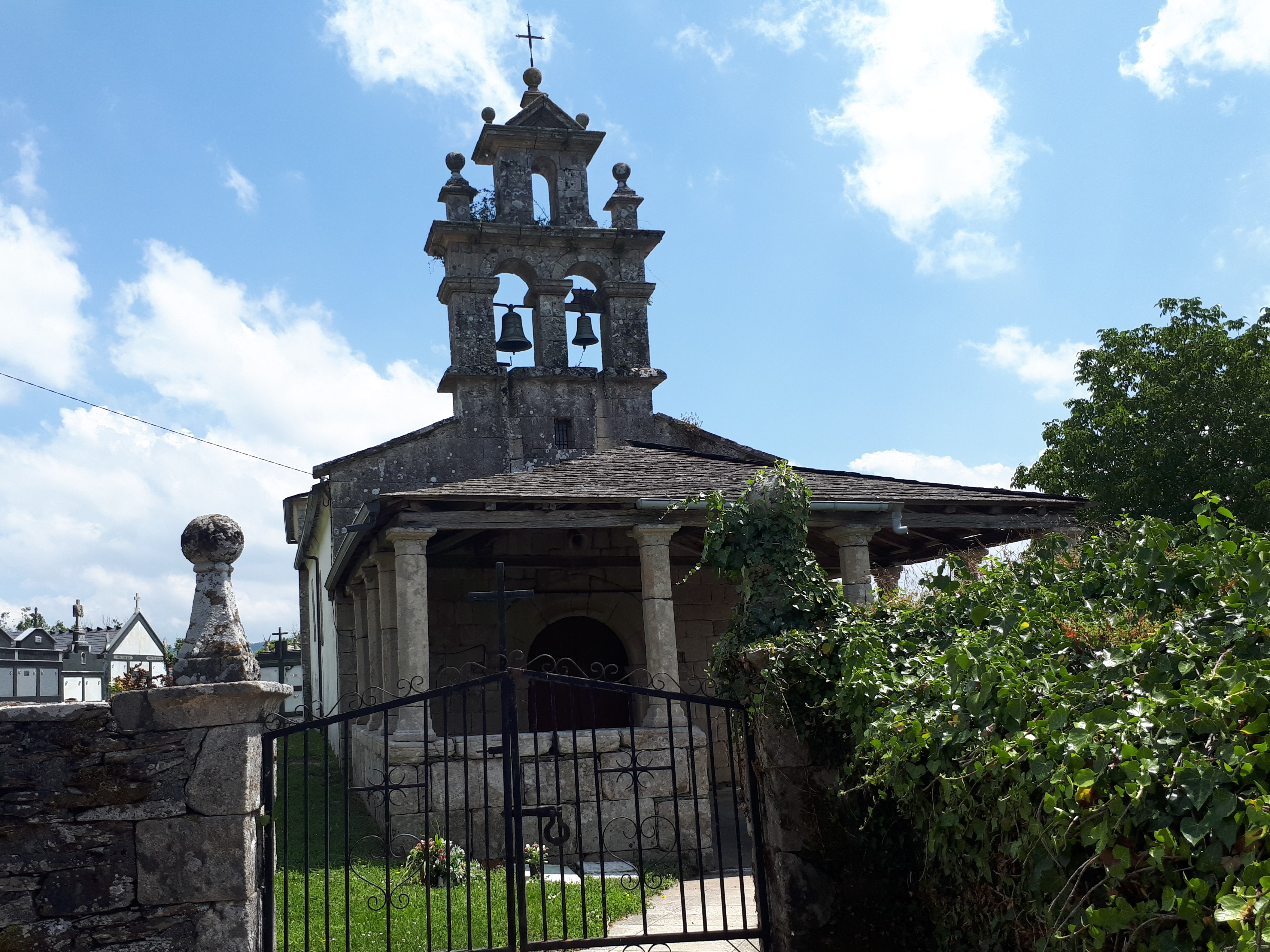 Igrexa de Pacios